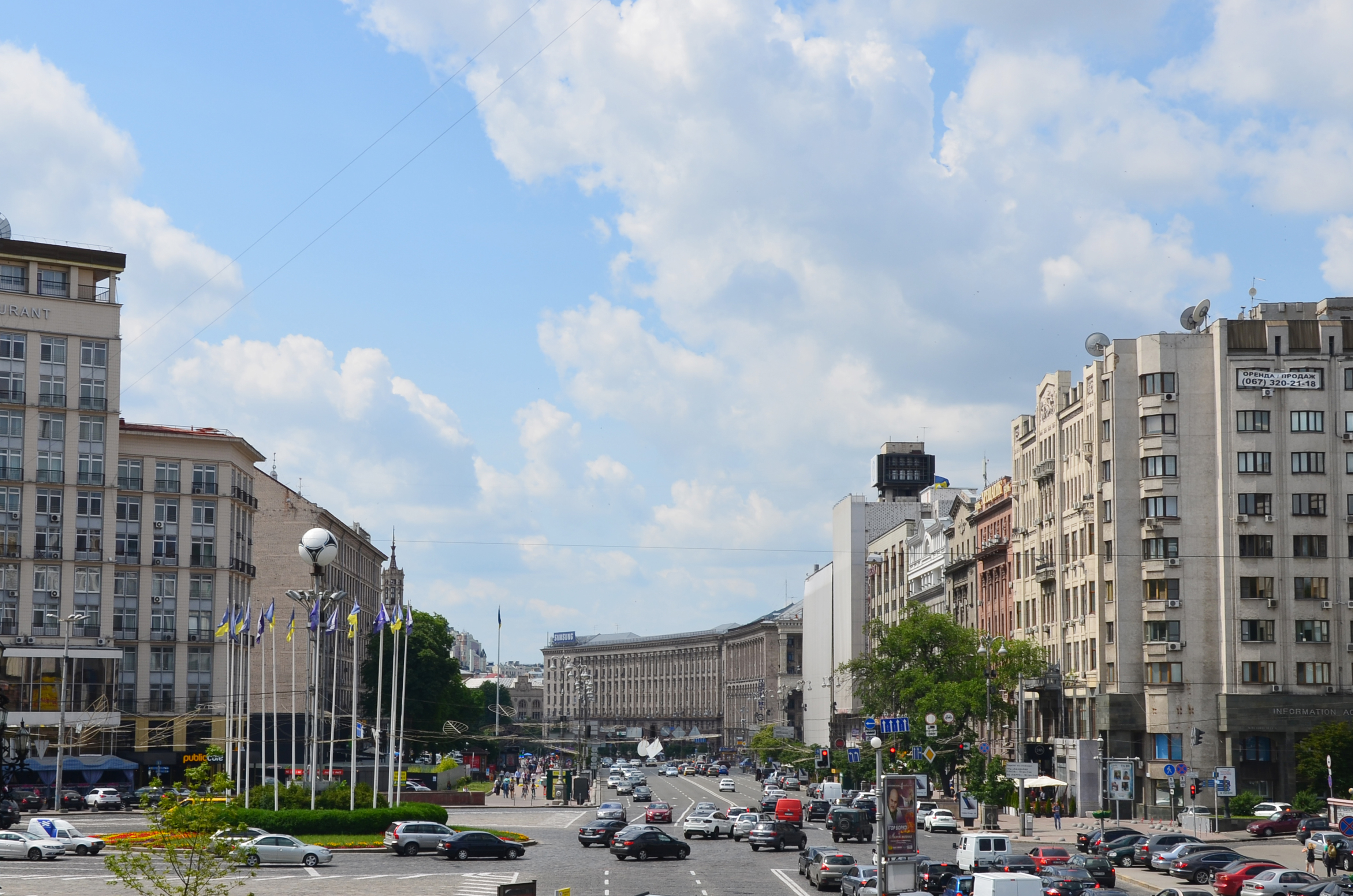 Початок вулиці Хрещатик у місті Києві.